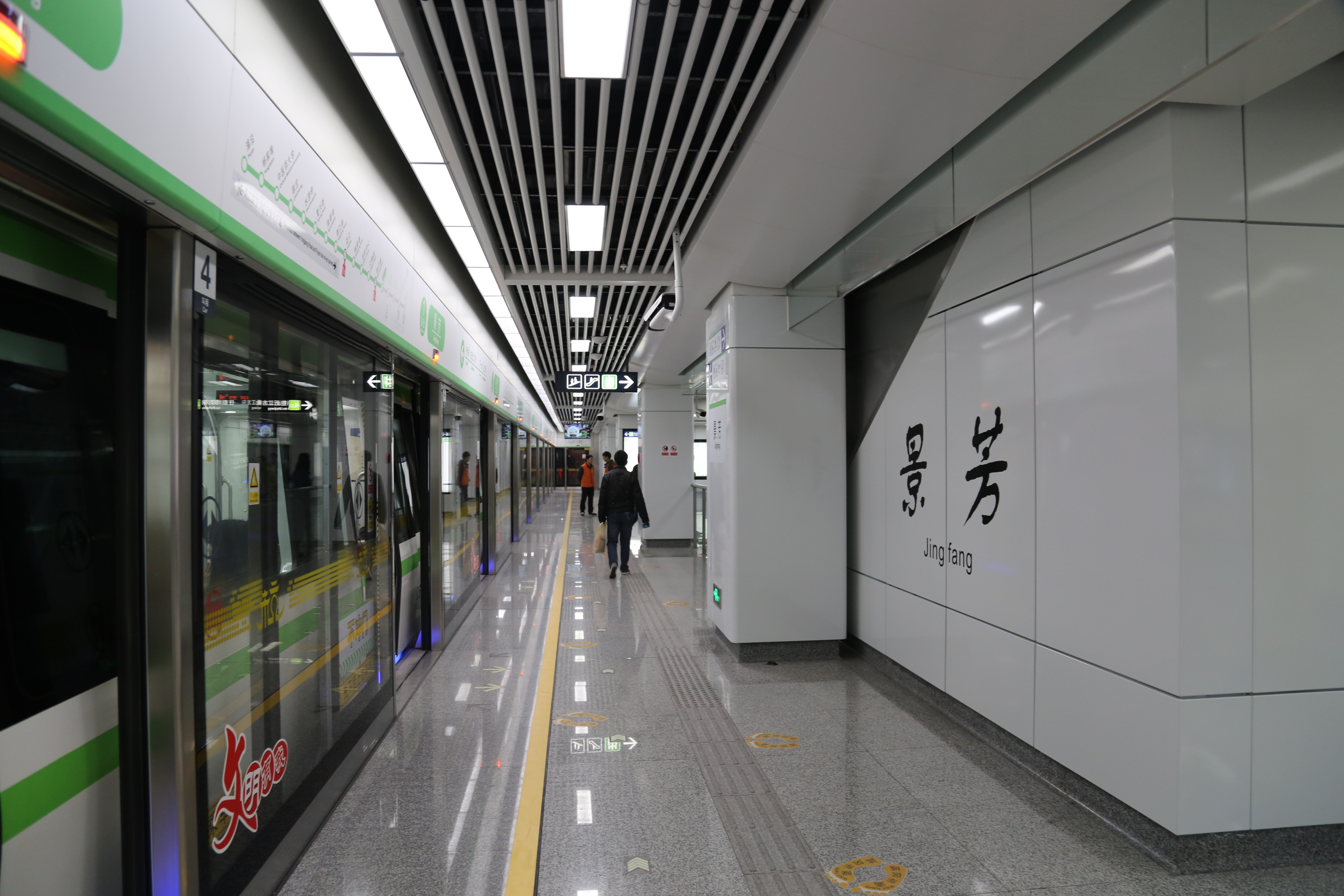 4号线景芳站标准角度